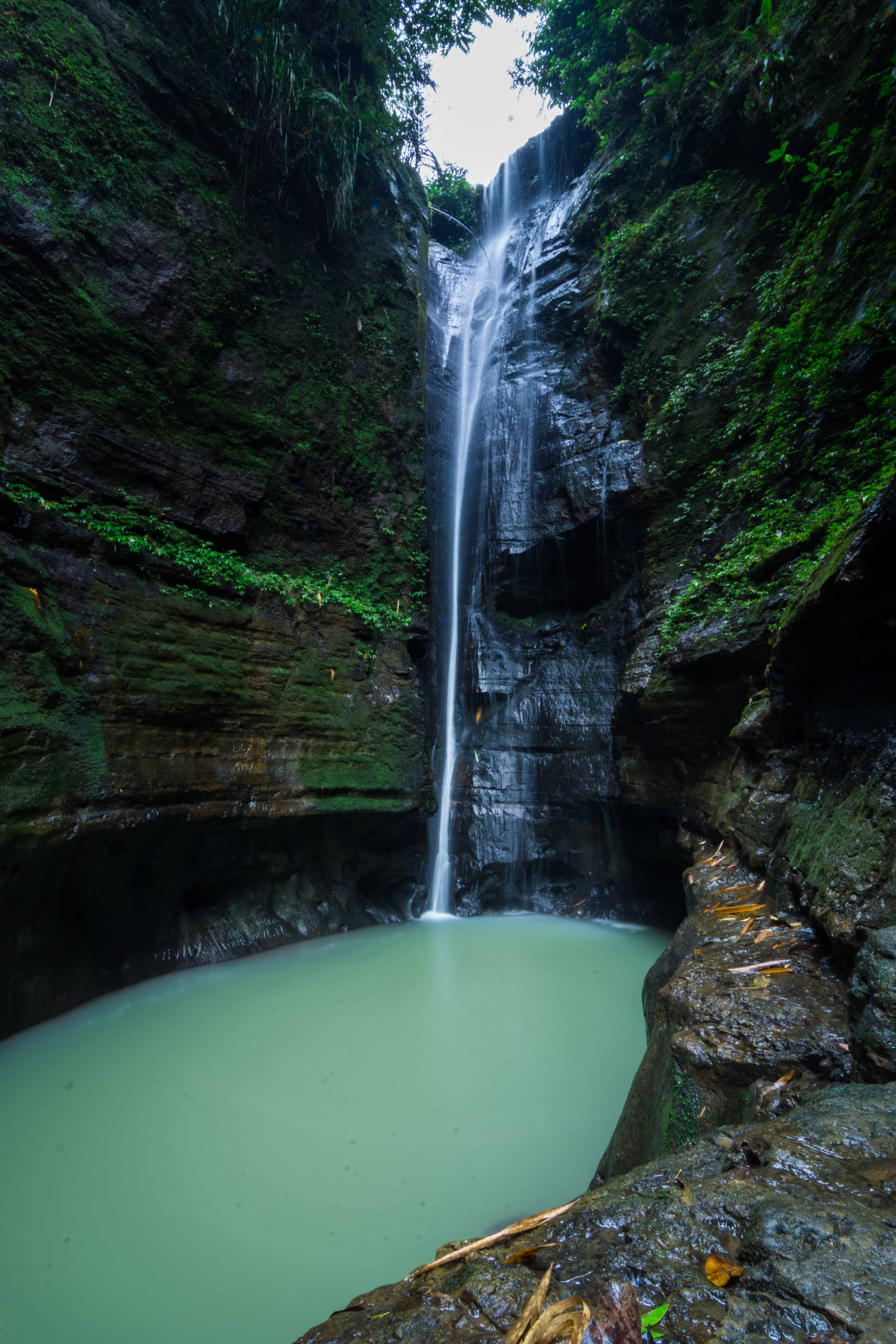 LOKASI : Desa Kaliurip , Purworejo